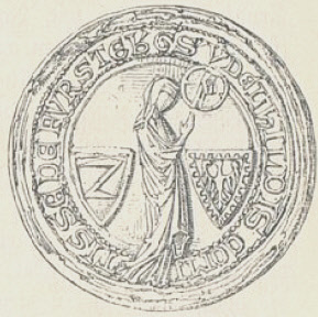 Witwensiegel der Gräfin Udilhild von Fürstenberg, geb. von Wolfach, der Witwe des Grafen Friedrich I. von Fürstenberg